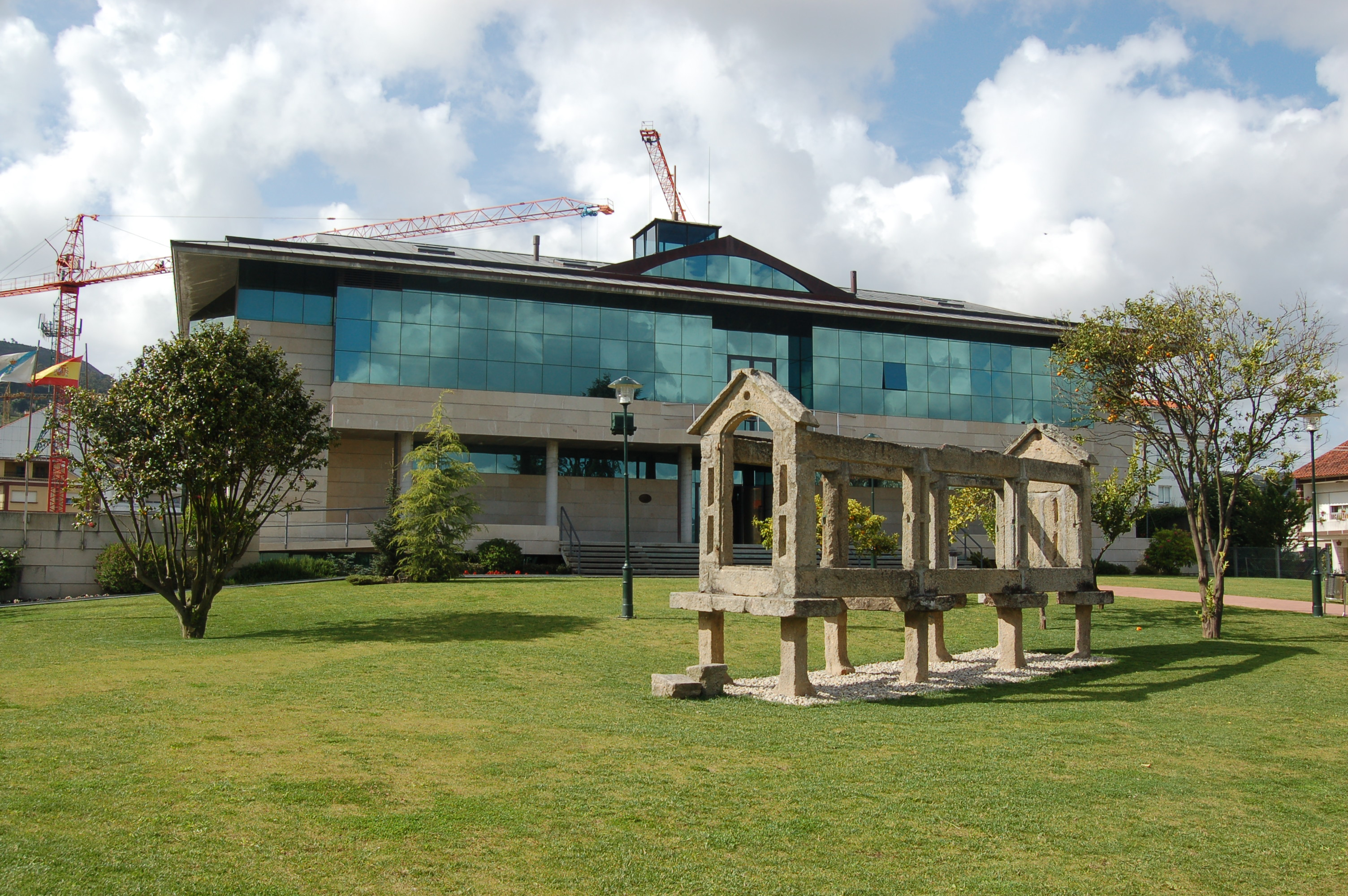 Casa consistorial de Moaña